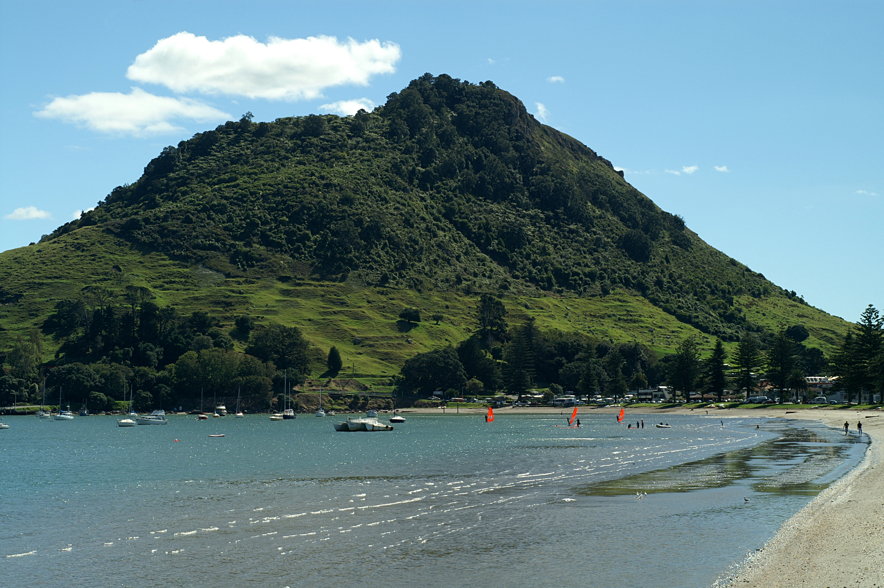 Mount Maunganui near Tauranga, New Zealand